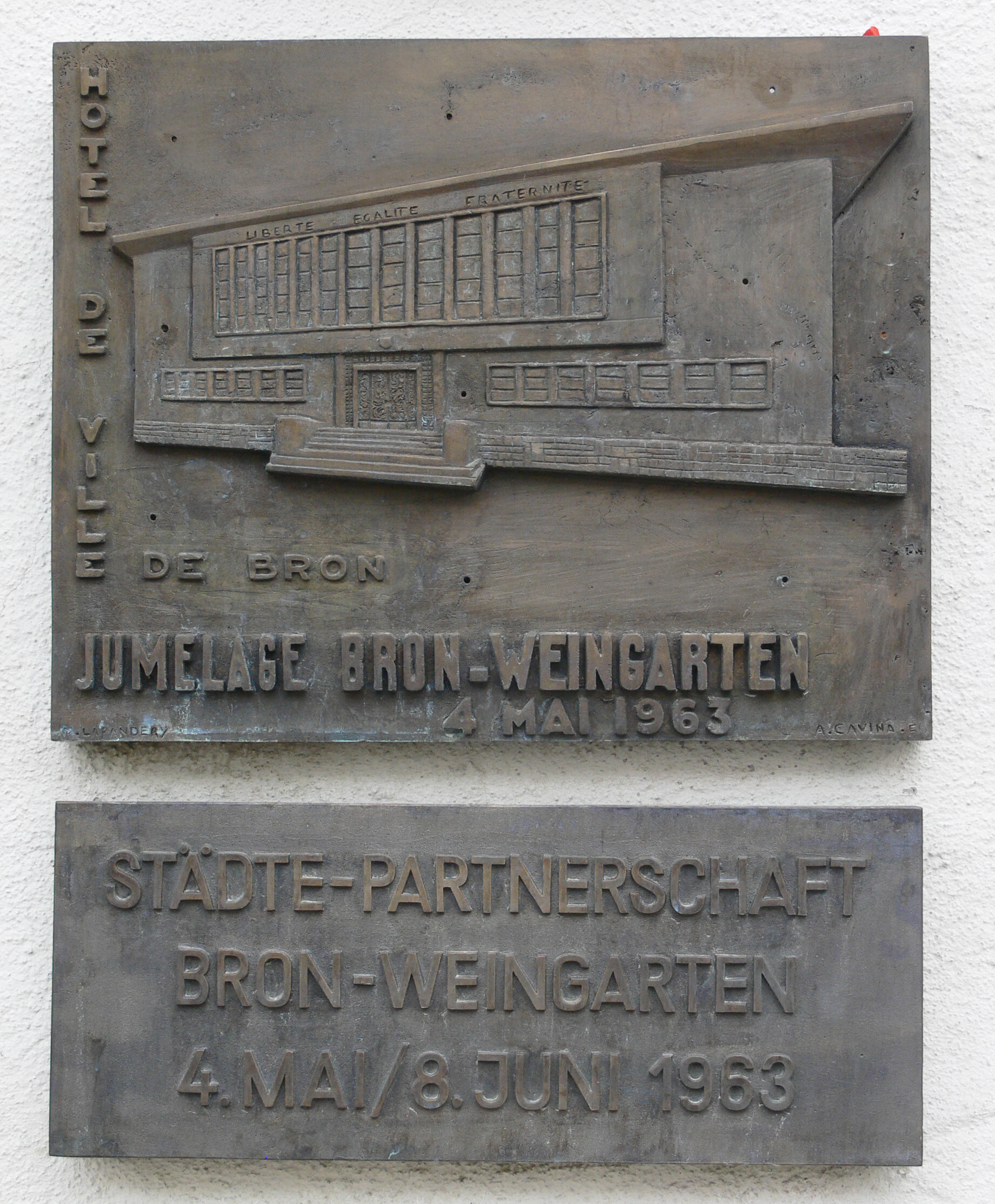 Weingarten (Württemberg), Amtshaus, Kirchstraße 2, Relieftafel zur Feier der Städtepartnerschaft mit Bron, Frankreich